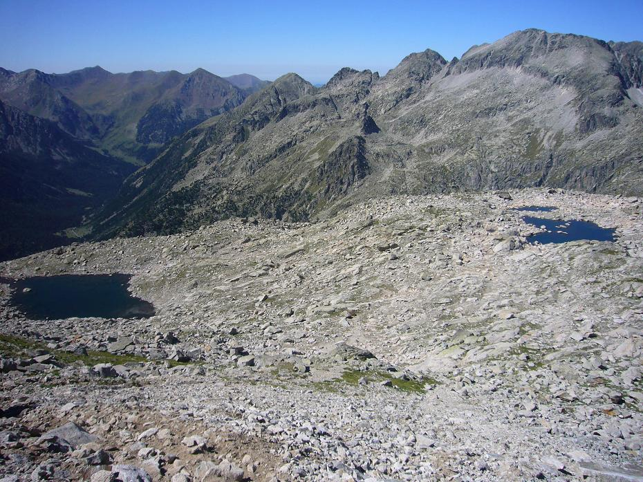 Els més orientals dels Estanys Gelats de Contraix; la Vall de Boí, Alta Ribagorça, Catalunya